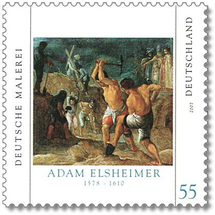 Sonderbriefmarke “Die Ausgrabung der Kreuze” (aus der Serie »Deutsche Malerei«) mit einem Gemälde von Adam Elsheimer ("Frankfurter Kreuzaltar", Predellentafel, 2. von links), Nennwert 55 cent, Maße: 35,00 × 35,00 mm, Hersteller: Giesecke & Devrient, Ausgabetag: 3. Mai 2007. Die Tafelmalerei war Teil des Frankfurter Kreuzaltar; das Gemälde ist im Städel-Museum Frankfurt am Main ausgestellt.